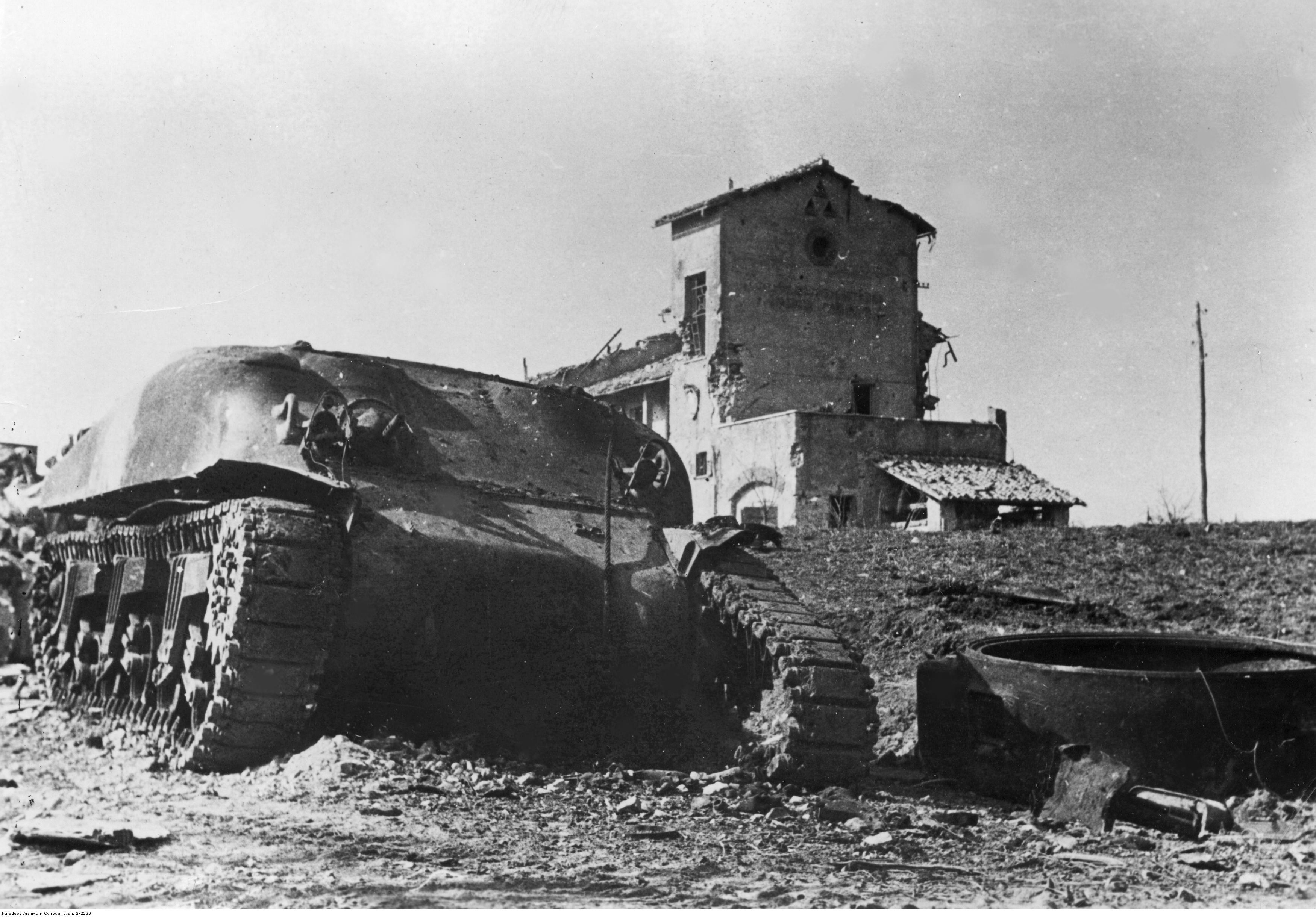 Czołg Sherman M4AI bez wieży na froncie pod Nettuno - Anzio. W tle zniszczone zabudowania.